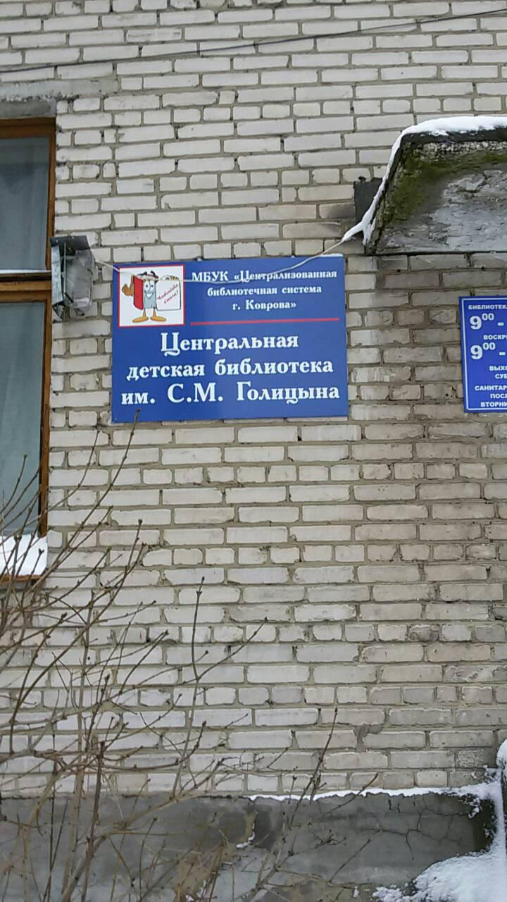 Табличка на входе в детскую библиотеку имени С. М. Голицына в Коврове